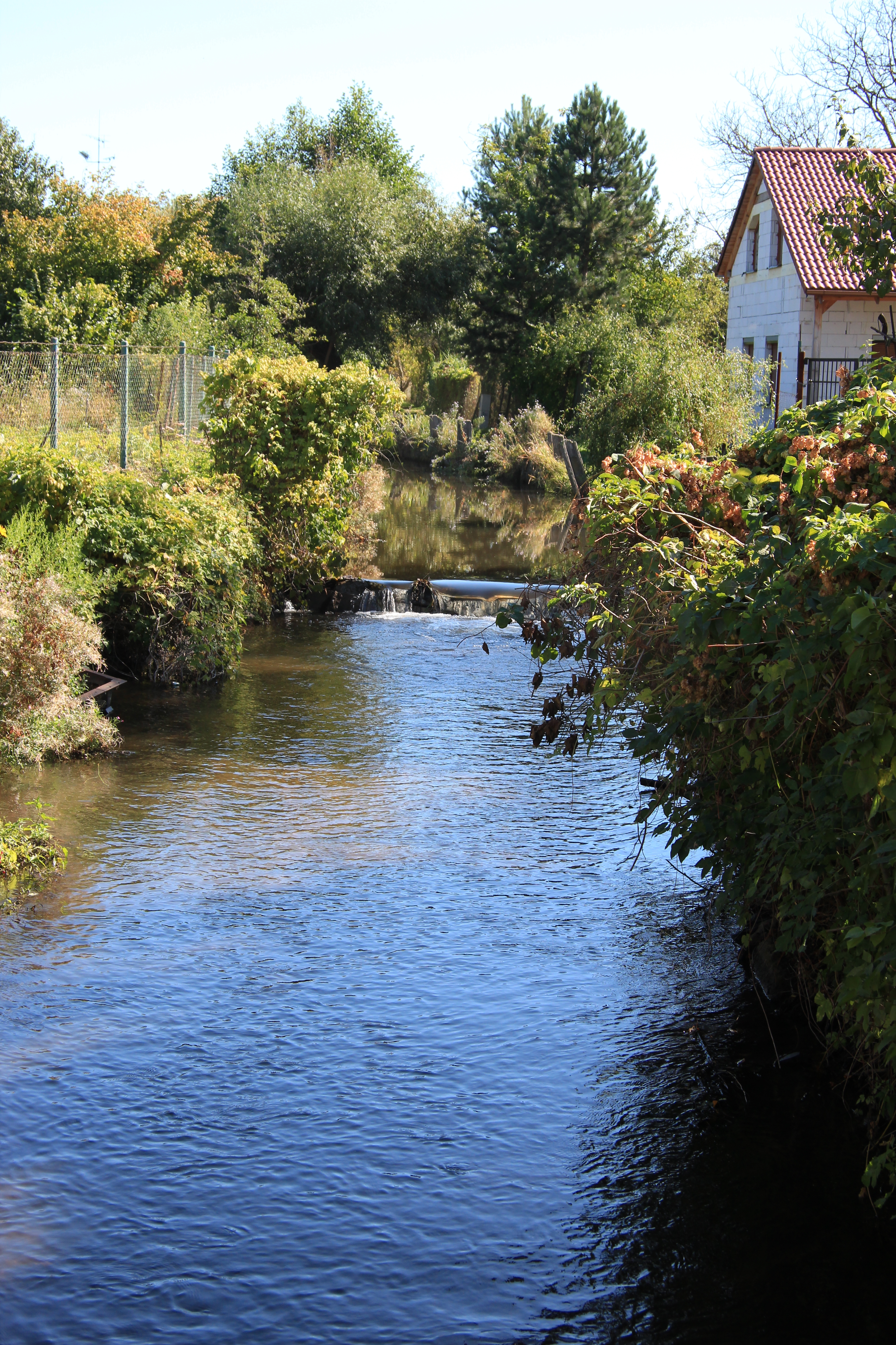 Bach im Habaner Dorf